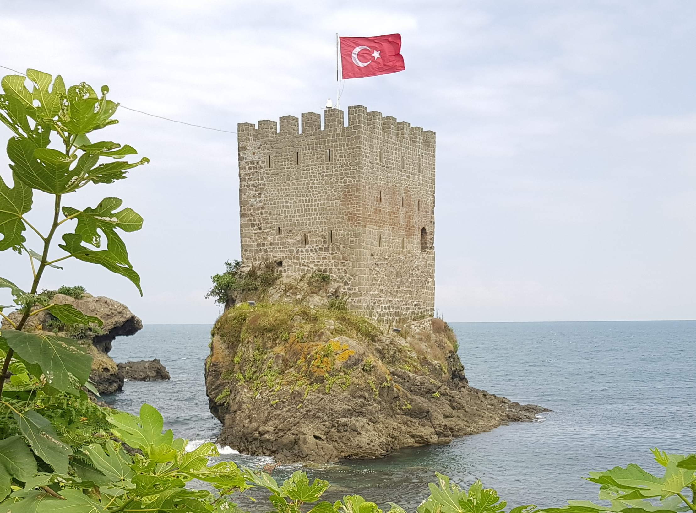 دریای سیاه قلعه دختر |kiz kalesi